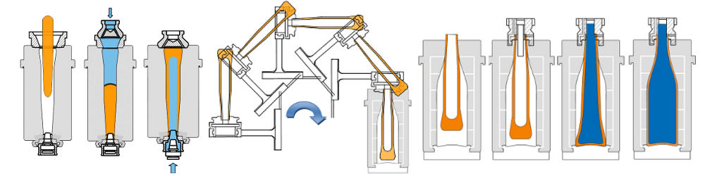 Blow and Blow process steps